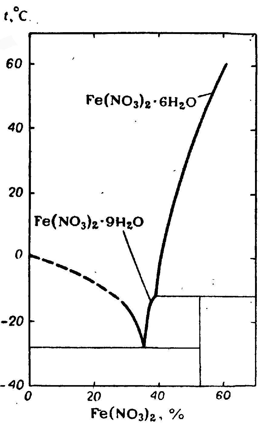 График растворимости нитрата железа (III) в воде